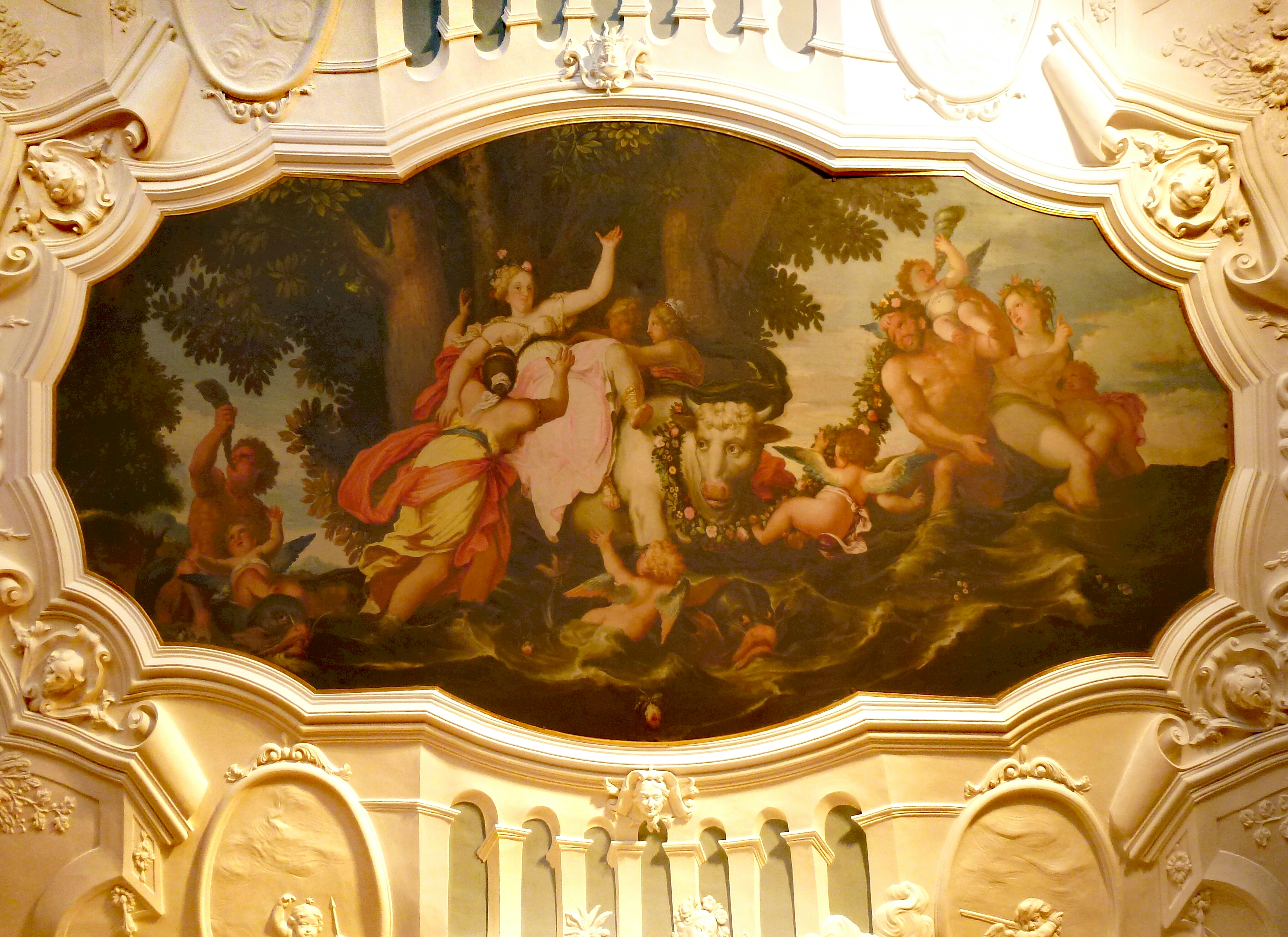 Schloss Eutin Europazimmer, Deckengemälde, Künstler unbekannt